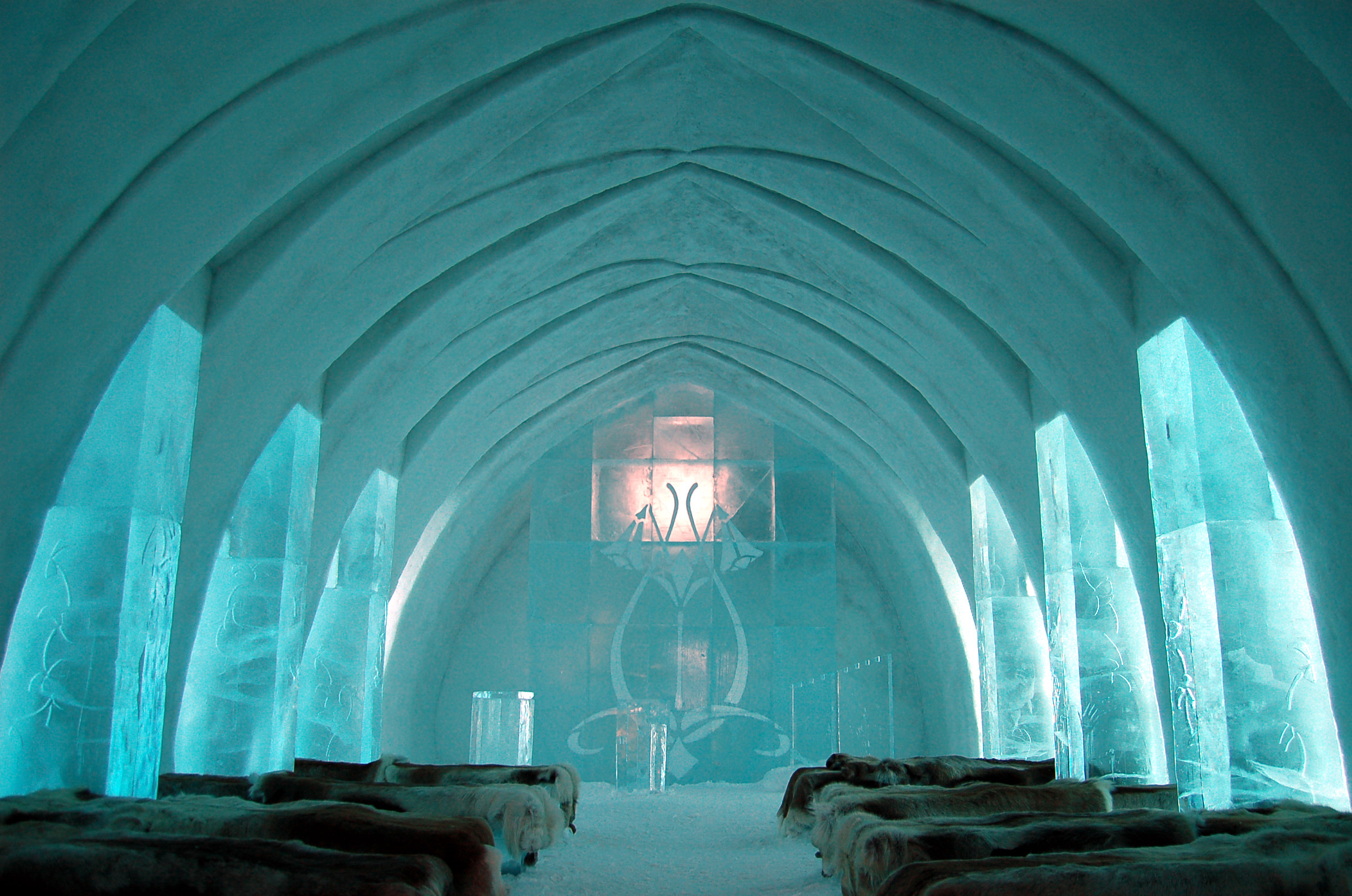 Ice Hotel Church @ Jukkasjärvi